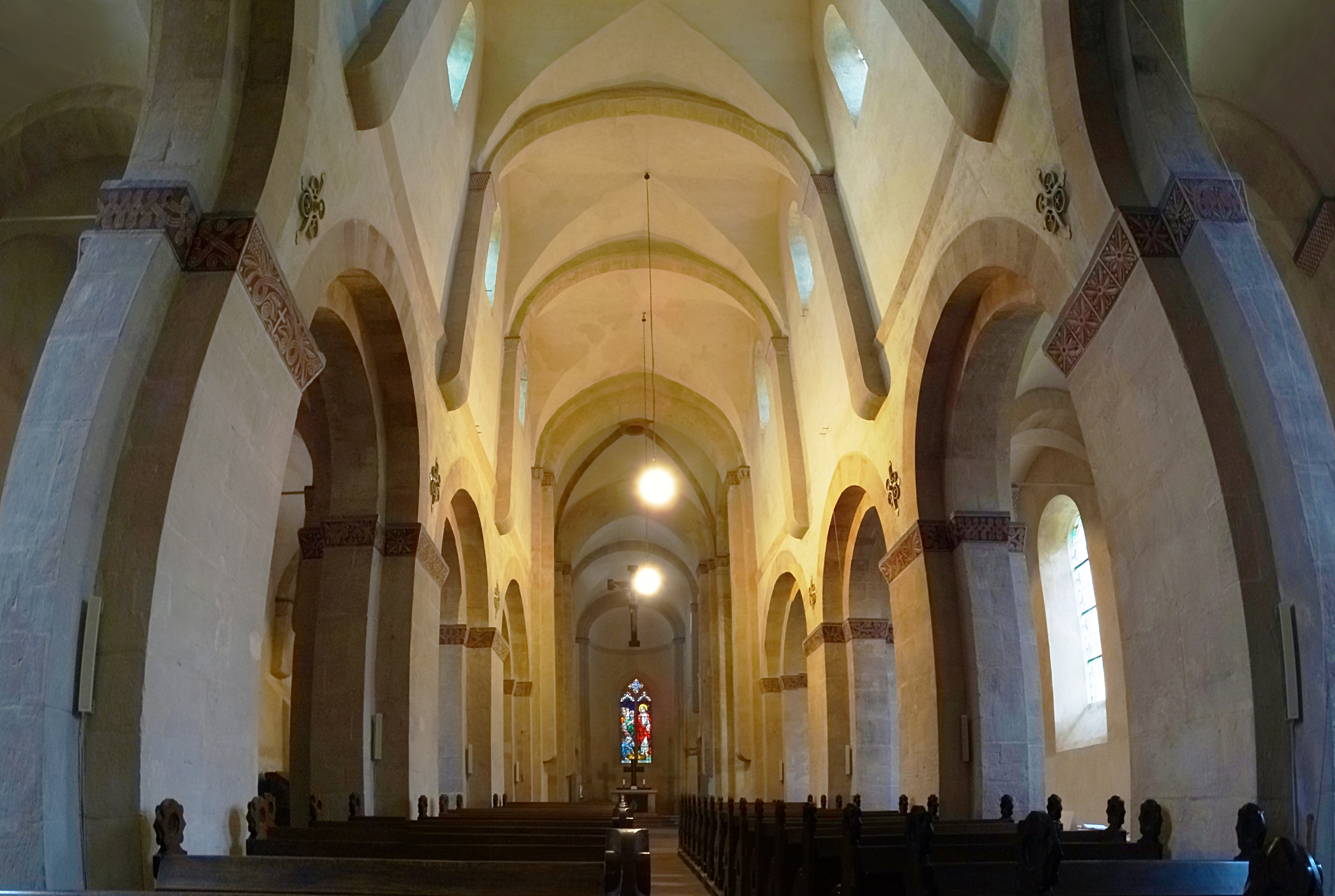 Romanische Pfeilerbasilika Sankt Ulrici (Sangerhausen), Innenraum Panorama